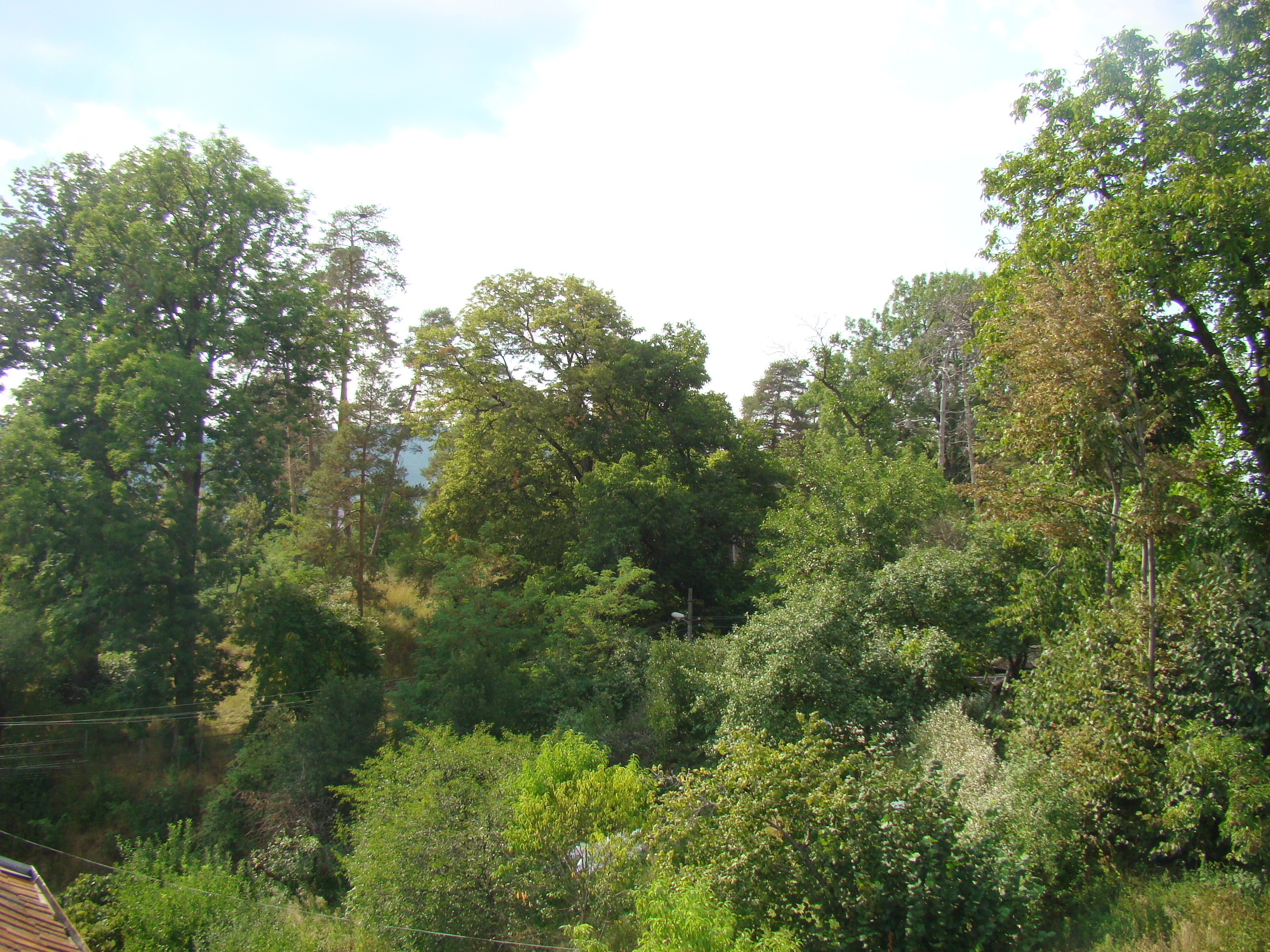 Ruinele bisericii "Sân Nicoară" (parcul), municipiul Curtea de Argeș, str. Sân Nicoară 1 02